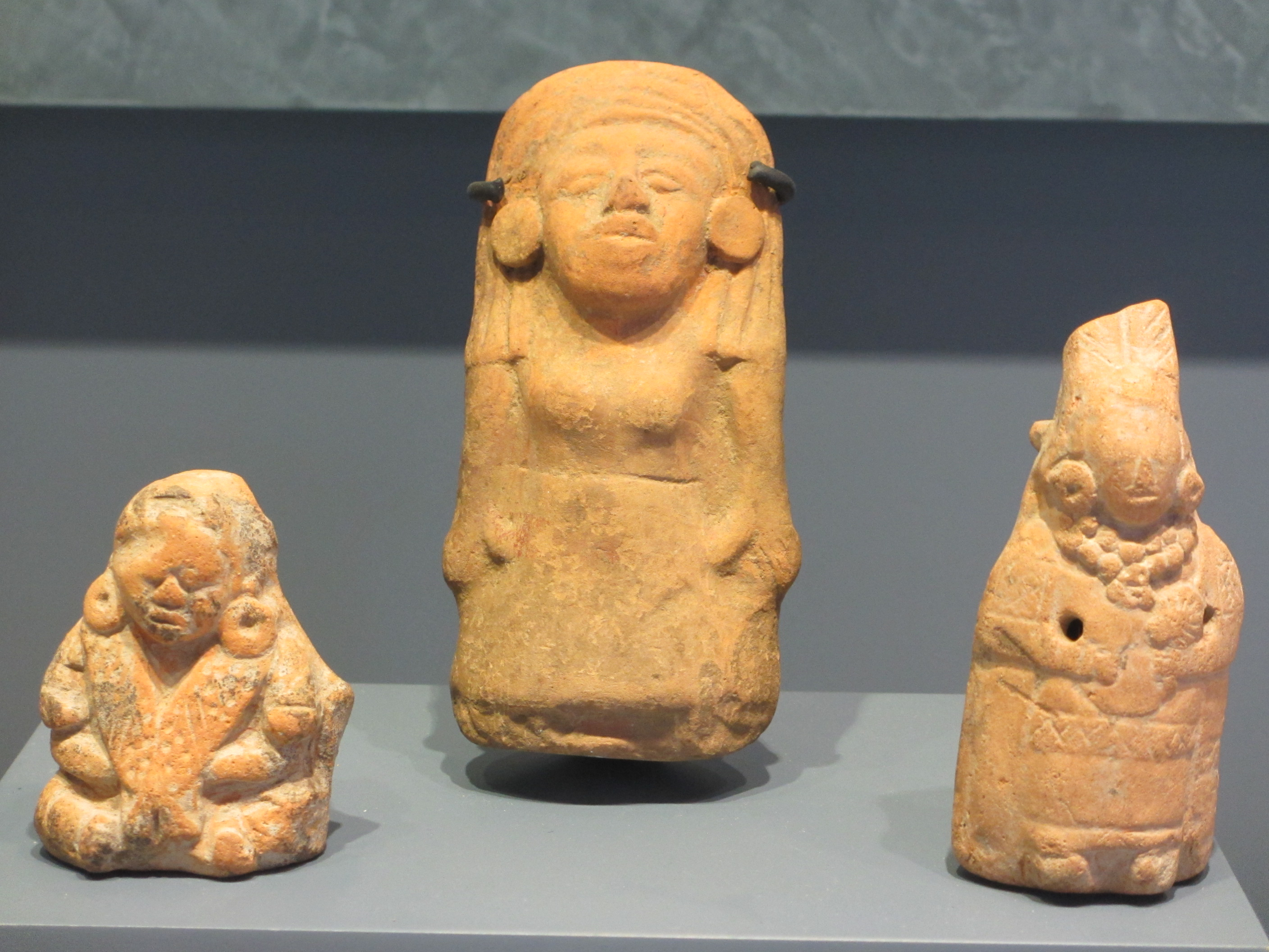 Figuras de barro representando mujeres. Zona arqueológica de Comalcalco. Tabasco México.